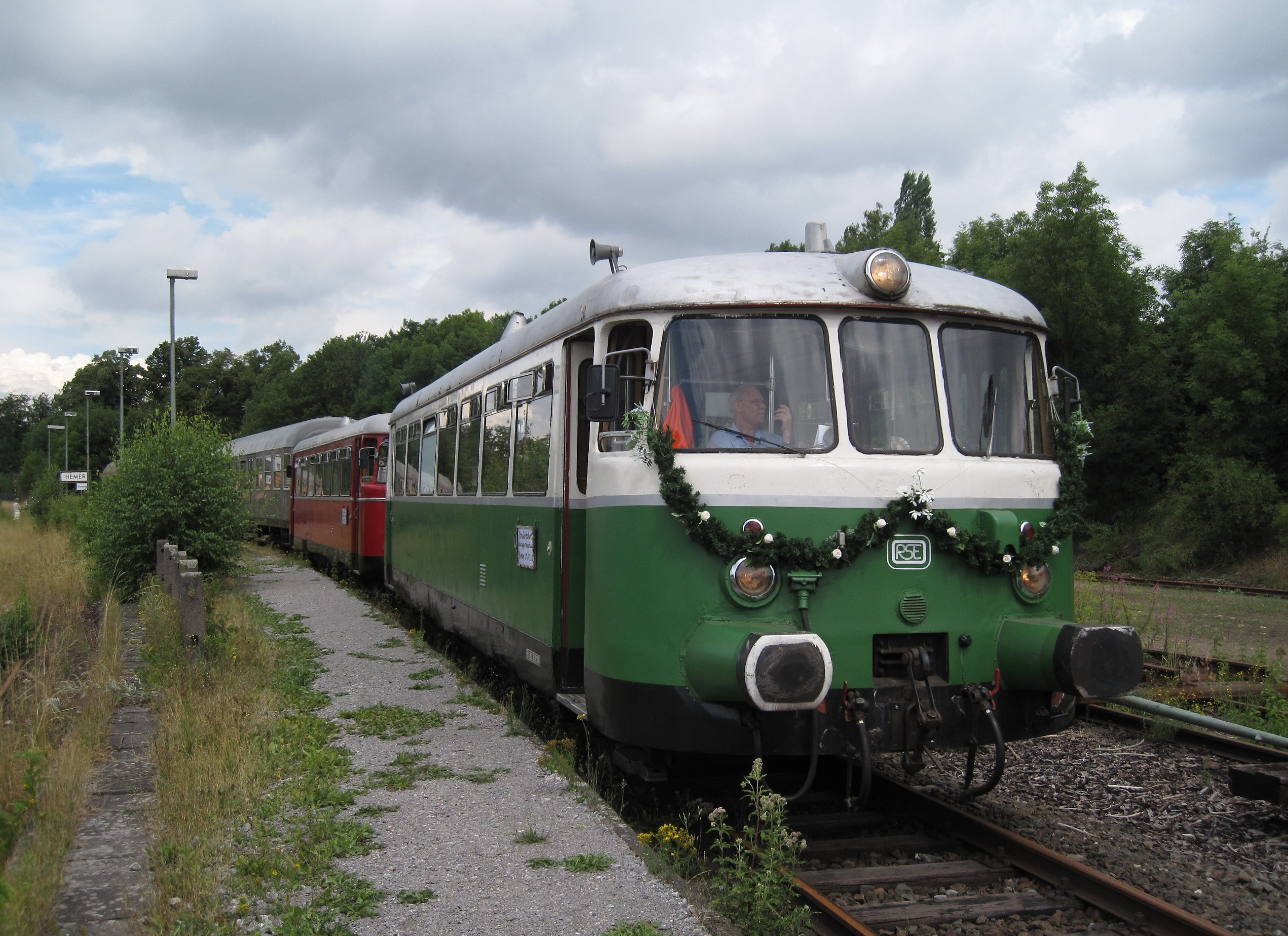 Ehemaliger Bahnhof Hemer. Sonderfahrt der Rhein-Sieg-Eisenbahn mit unter anderem den Schienenfahrzeugen VT 23 (grün/weiß) und VT 25 (rot) auf der reaktivierten Bahnstrecke Menden—Hemer „Oesetalbahn“ zur Landesgartenschau Hemer.